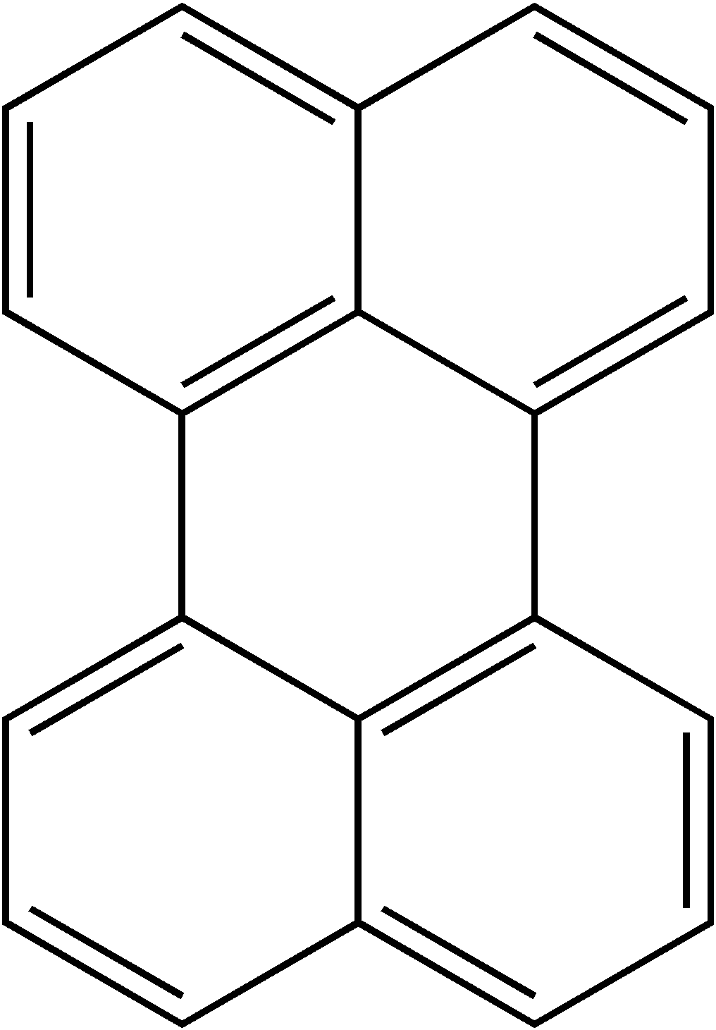 Struktur von Perylen